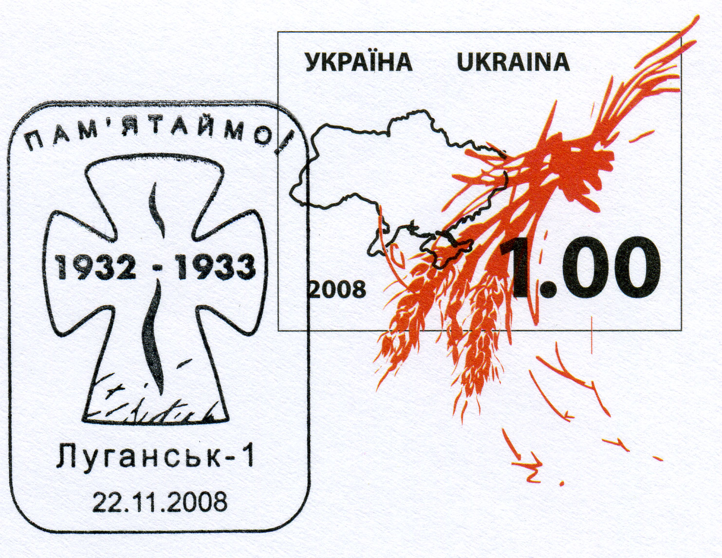 Спецгашение. 22.11.2008 Луганск. Голодомор